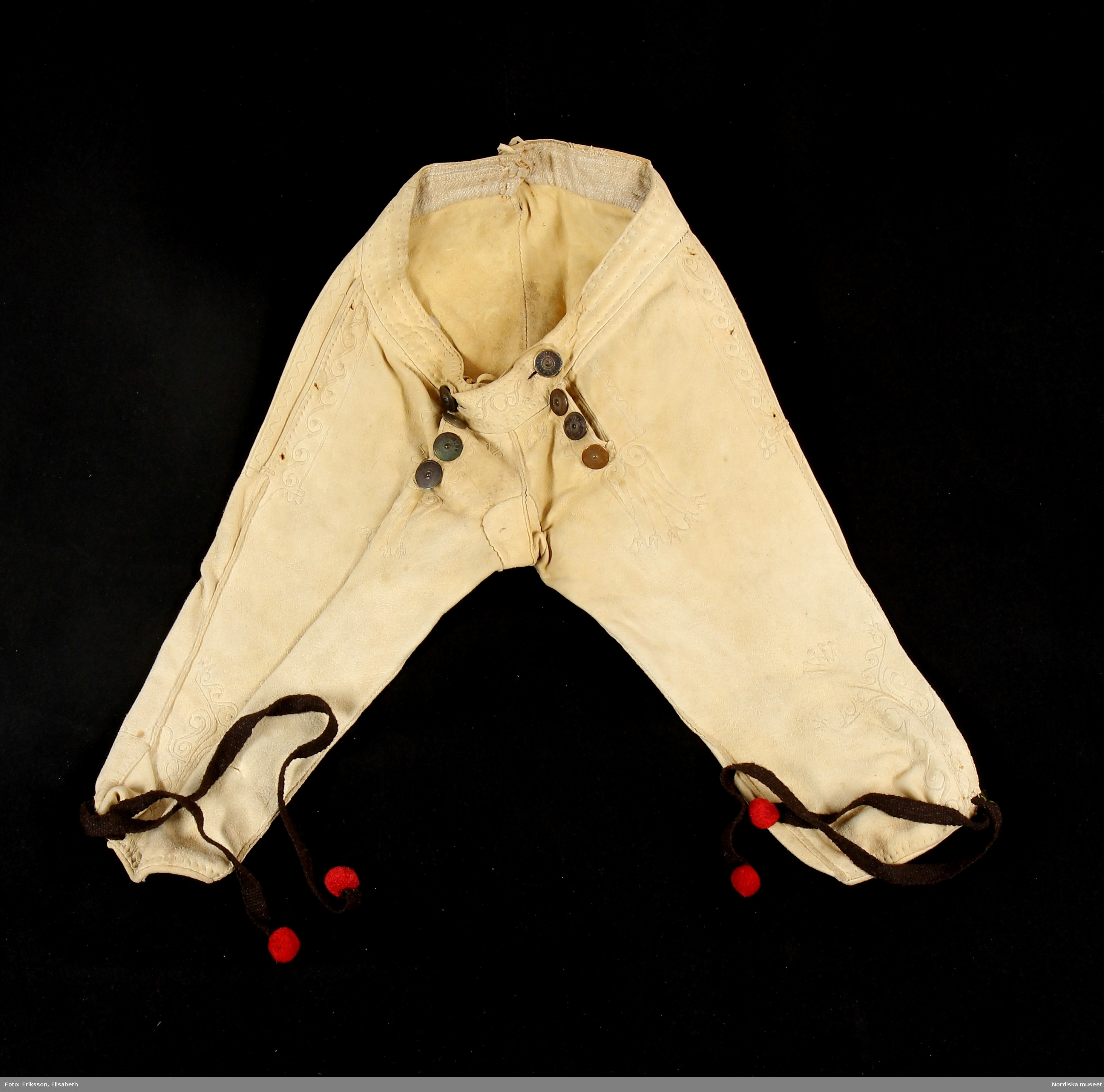 Huvudliggaren: "Mandräkt från Boda sn Dalarna A. Rock, längd 107 cm (m. kraglinning) B. Skinnbyxor C. Väst "livstycke" D. Skor E. Förskinn "skimpa" F. Bröstlapp "halskrage" A. Rock av svart vadmal, 2 fram- och 2 ryggstycken, helskurna. På insidan av framkanterna röda klädeslister, den högra med 6 hakar av mässing, på den vänstra 6 hyskor på utsidan. Isydd ärm med ärmsprund med hake och hyska och infodring av oblekt linnelärft. Kring halsen en 2,4 cm bred halslinning. Öppningar i sidsömmar. Berit Eldvik 2004